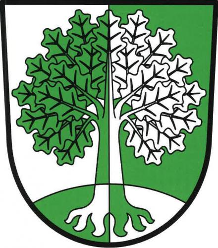 Dubenec (okres Trutnov), znak obce